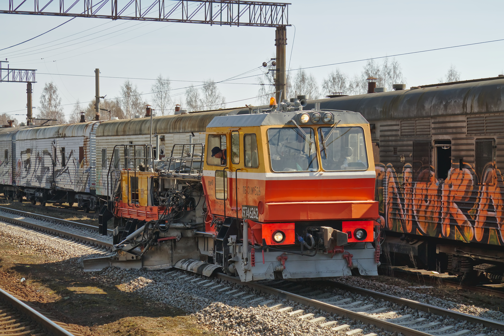 Планировщик балласта ПБ-01 №526, станция Лебяжье. см. фото 590512 в альбоме автора